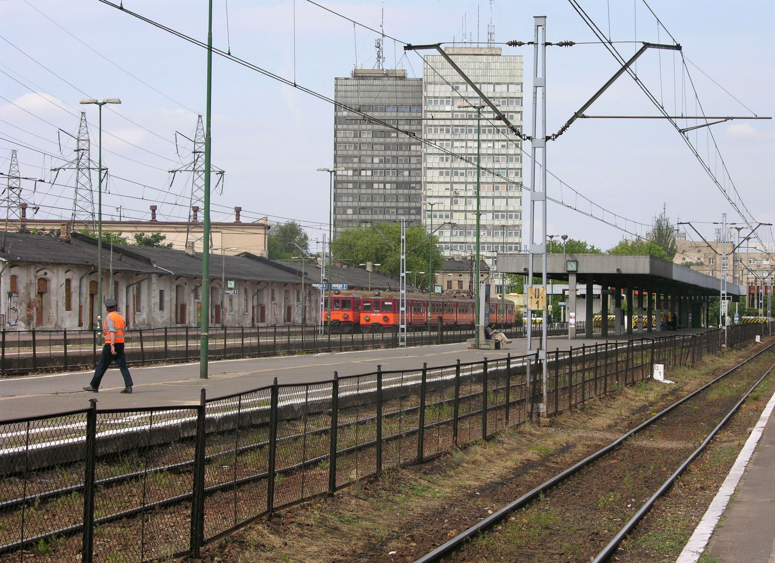 Perony dworca kolejowego Łódź Fabryczna (przed przebudową).